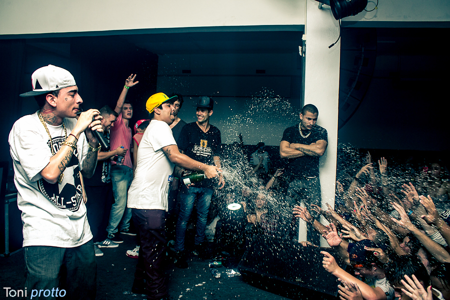 Up House Gravataí - RS